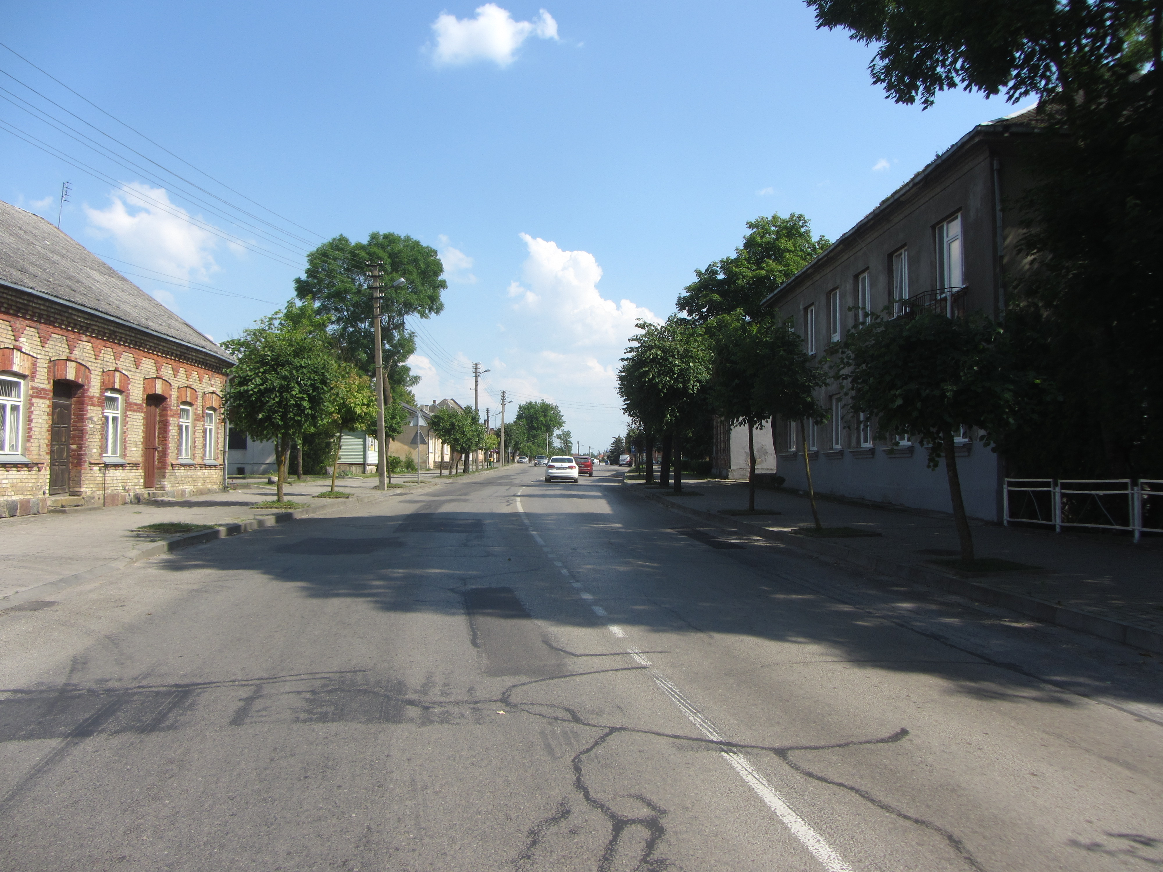 Simnas, Lithuania